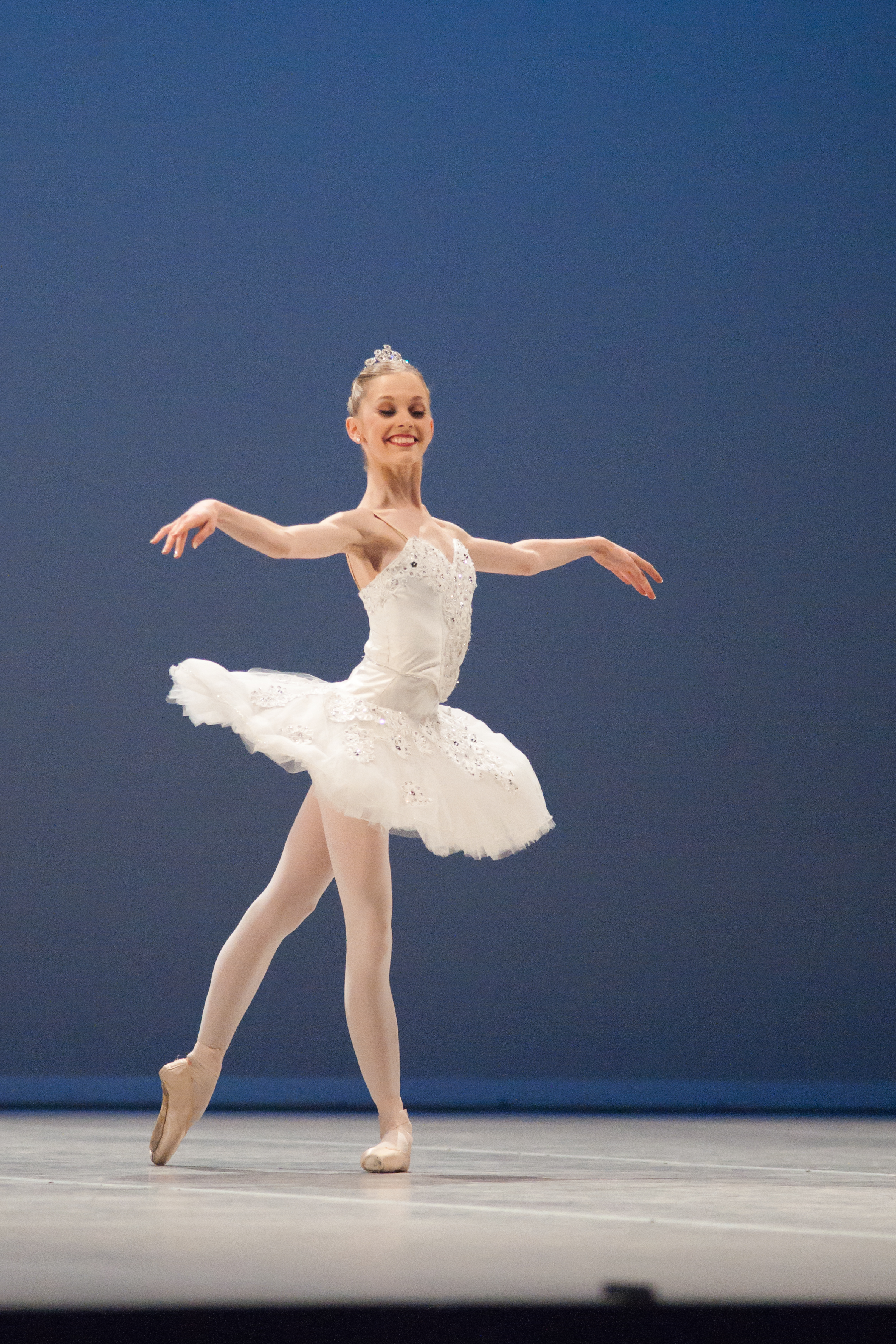 Variation extraite de La Belle au bois dormant au Prix de Lausanne 2010. The making of this document was supported by Wikimedia CH. (Submit your project!) For all the files concerned, please see the category Supported by Wikimedia CH.